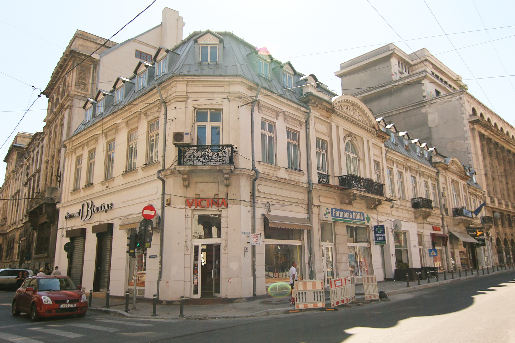 imobil pe Victoriei nr. 26